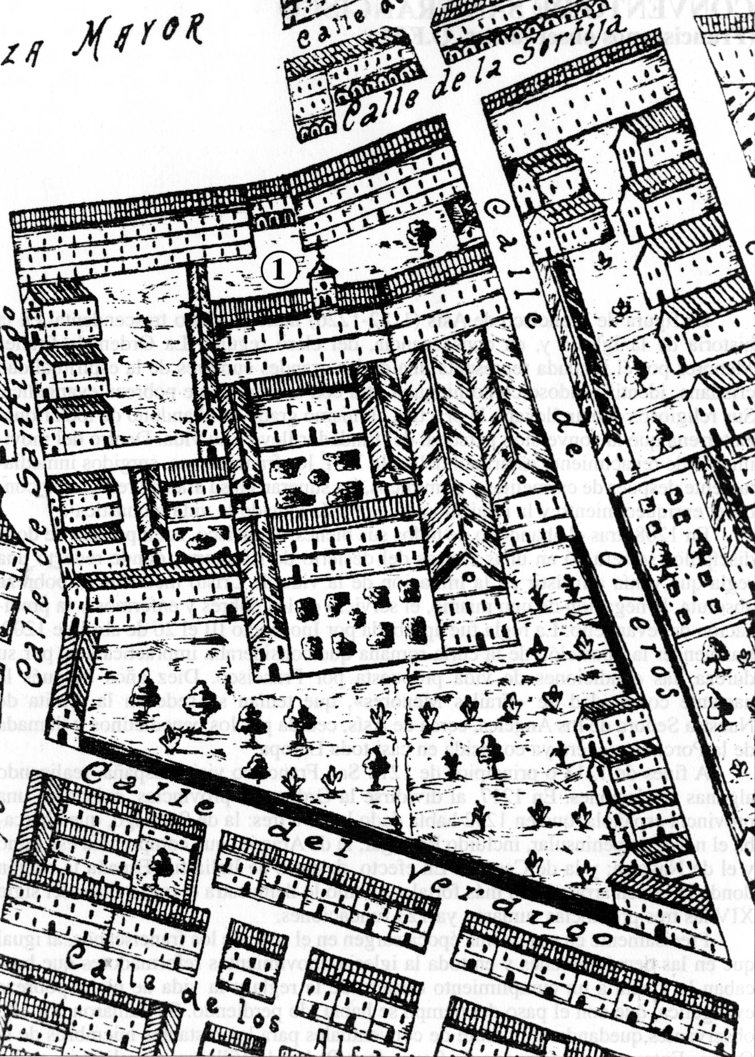 Convento de San Francisco en Valladolid ubicado en el plano de Ventura Seco de 1738